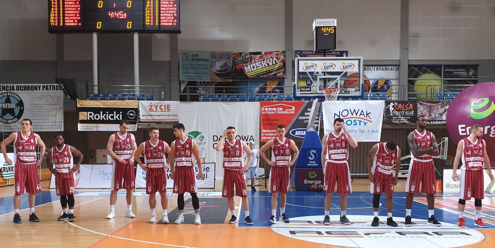 MKS Dąbrowa Górnicza Spójnia Stargard